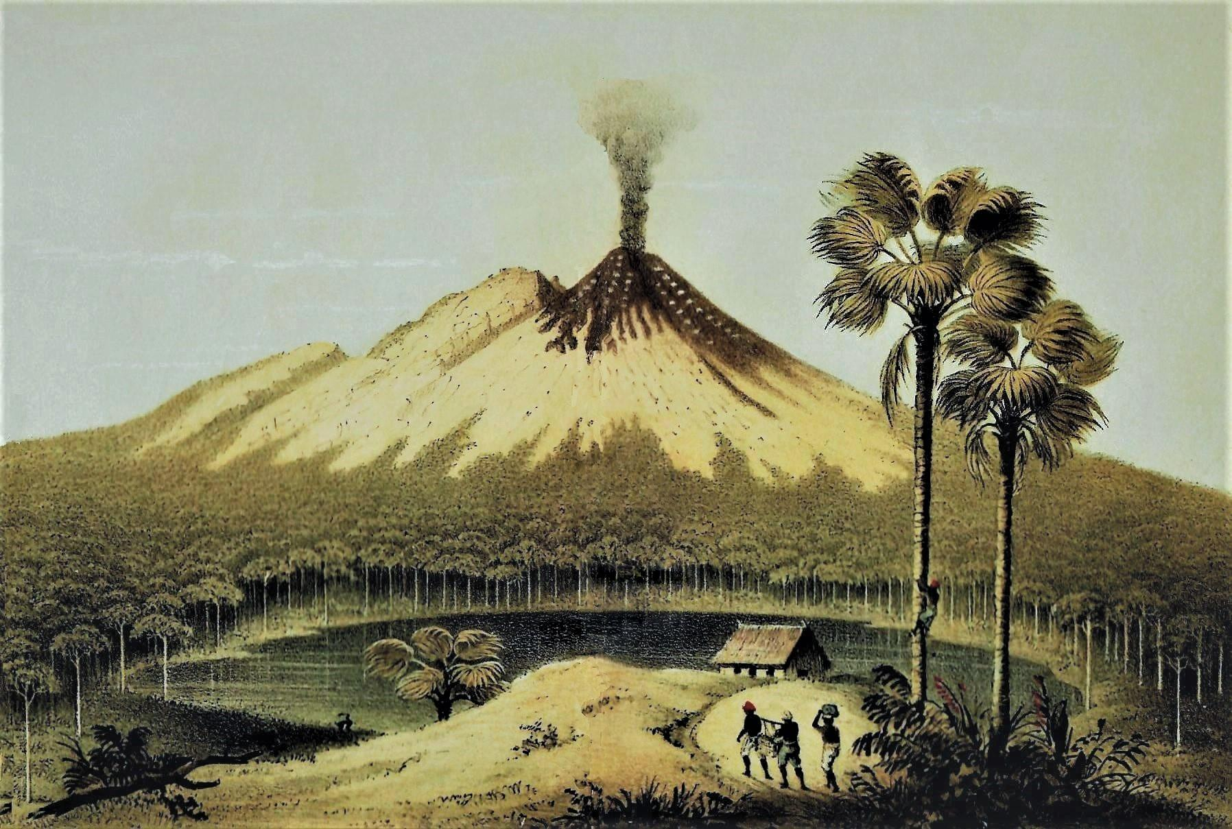 Gunung Lamongan. Titelbild im ersten Band.